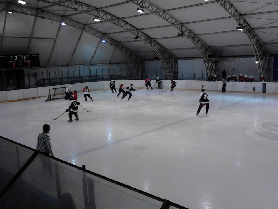 Srpski (latinica): Prvo kolo Hokejaške lige Srbije između Srbije U20 i Partizana